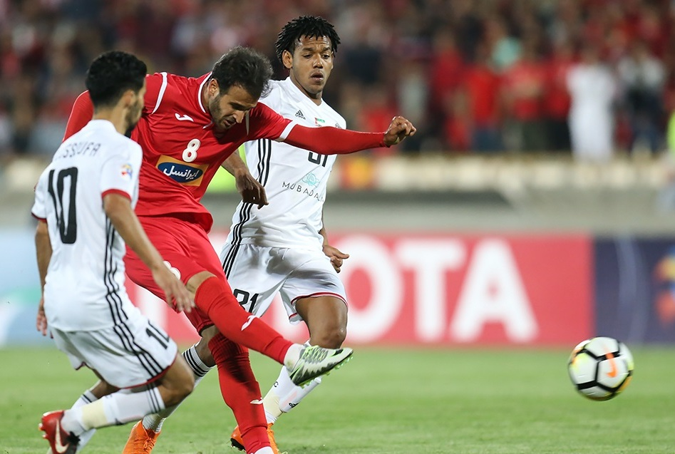 دیدار تیم‌های «پرسپولیس و الجزیره امارات» شامگاه دوشنبه ۲۴ اردیبهشت ۱۳۹۷